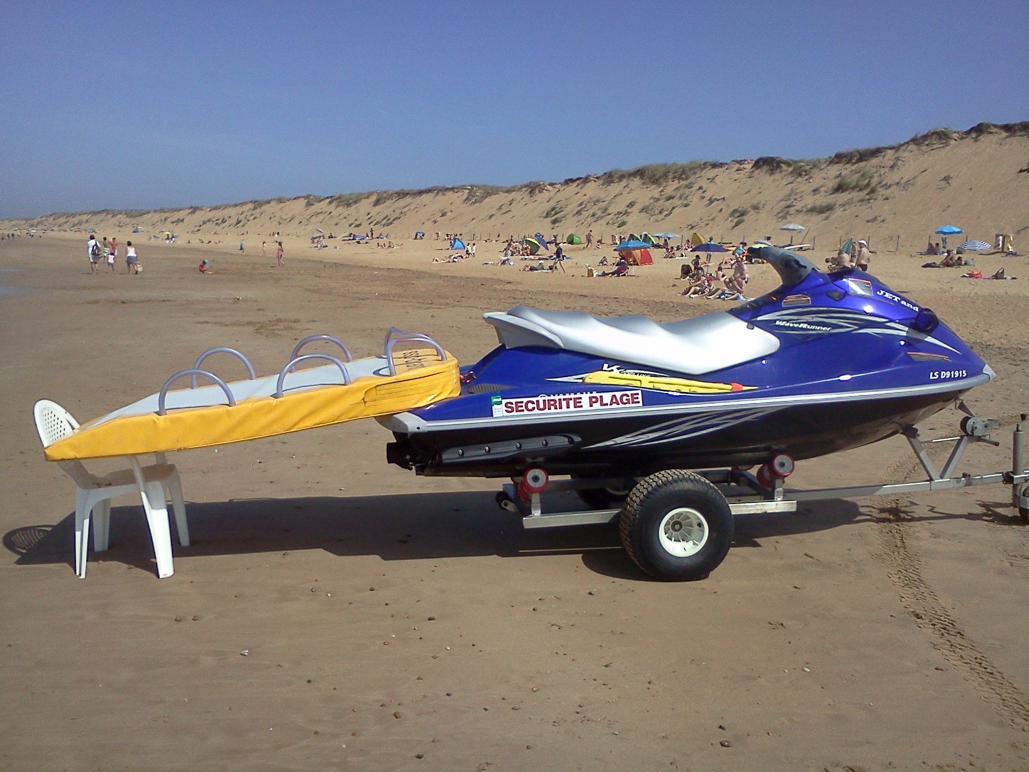 Moyen de sauvetage à Olonne sur mer en Vendée